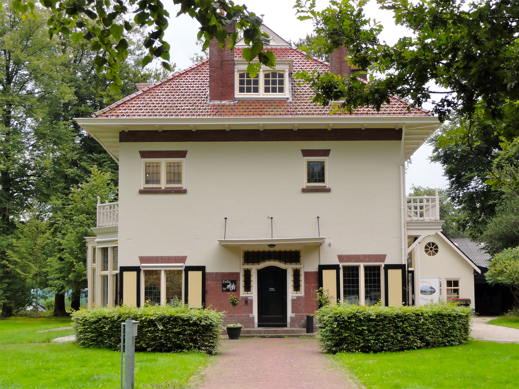 Huize Olterterp te Olterterp